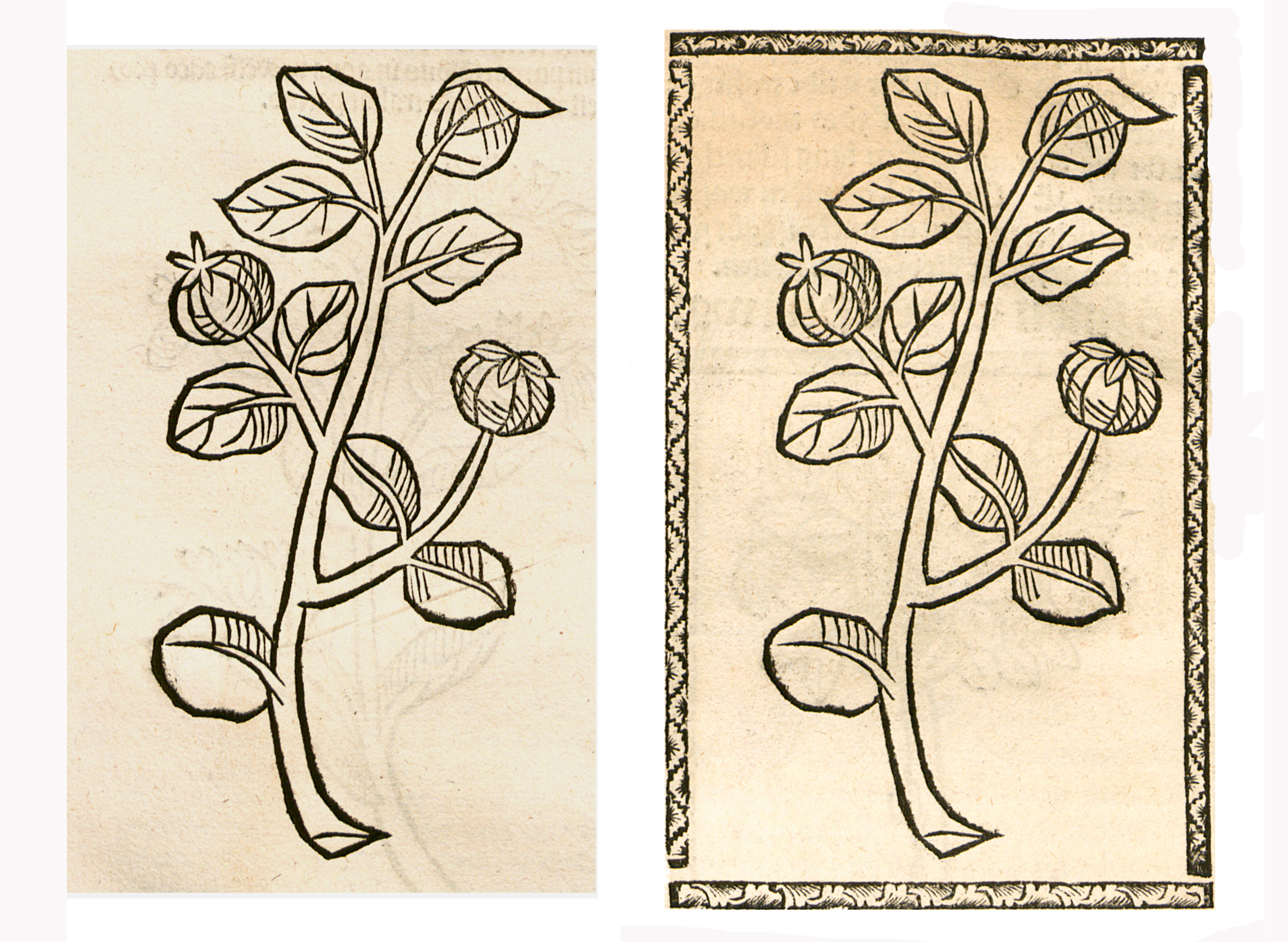 Abbildung von: Öpfel, Wilde (Malus sylvestris)